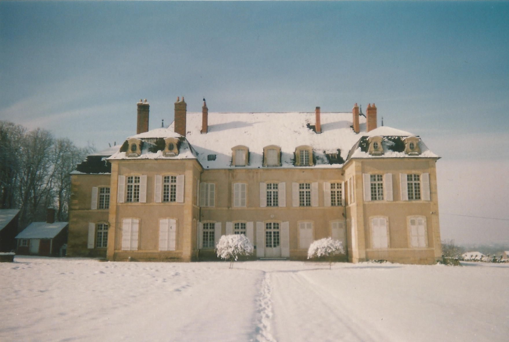 Ch de Sermoise vue E